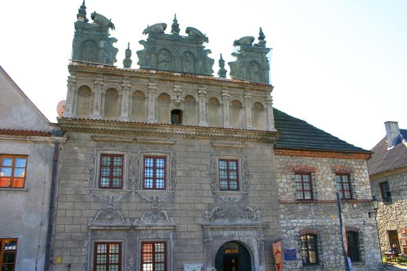 Kazimierz Dolny in Poland - kamienica Celejowska